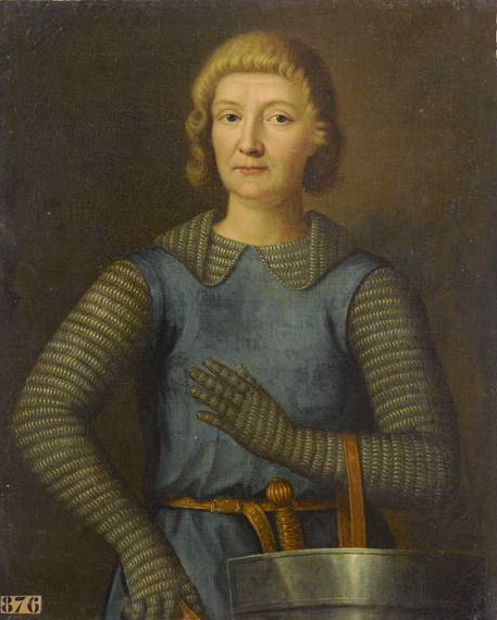 Enguerrand de Coucy, amiral de France en 1285